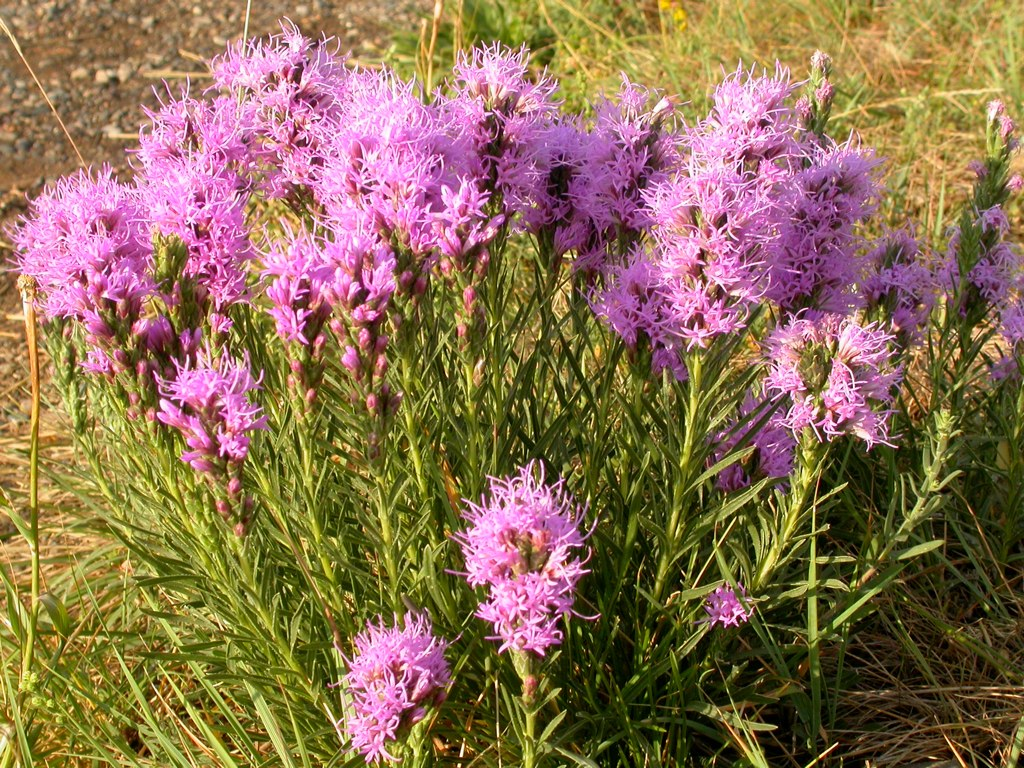 Liatris punctata habit